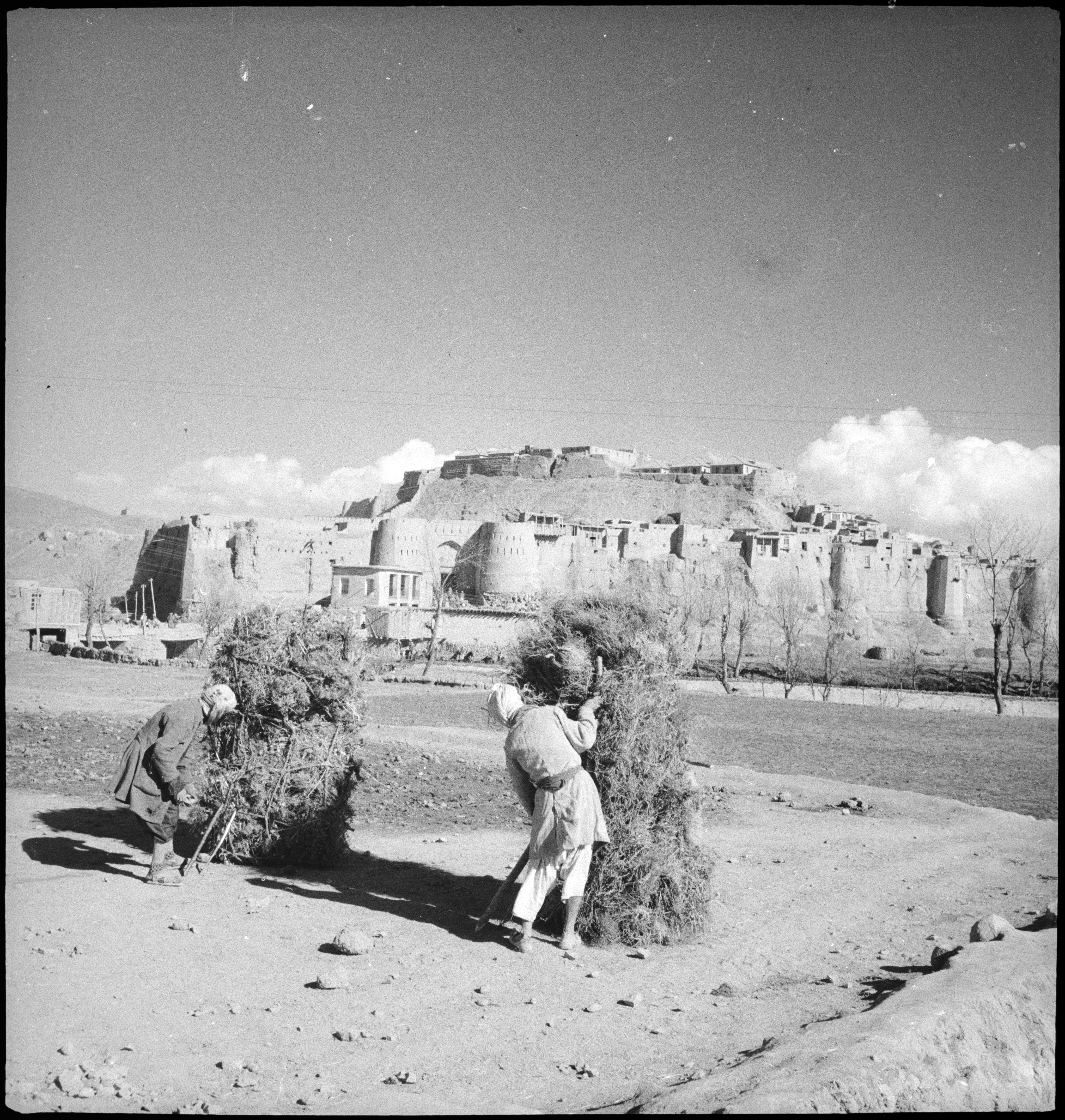 Afghanistan, Ghazni (Ghazna): Menschen; Zwei Männer beim Heustapeln, im Hintergrund die Stadtmauer von Ghazni